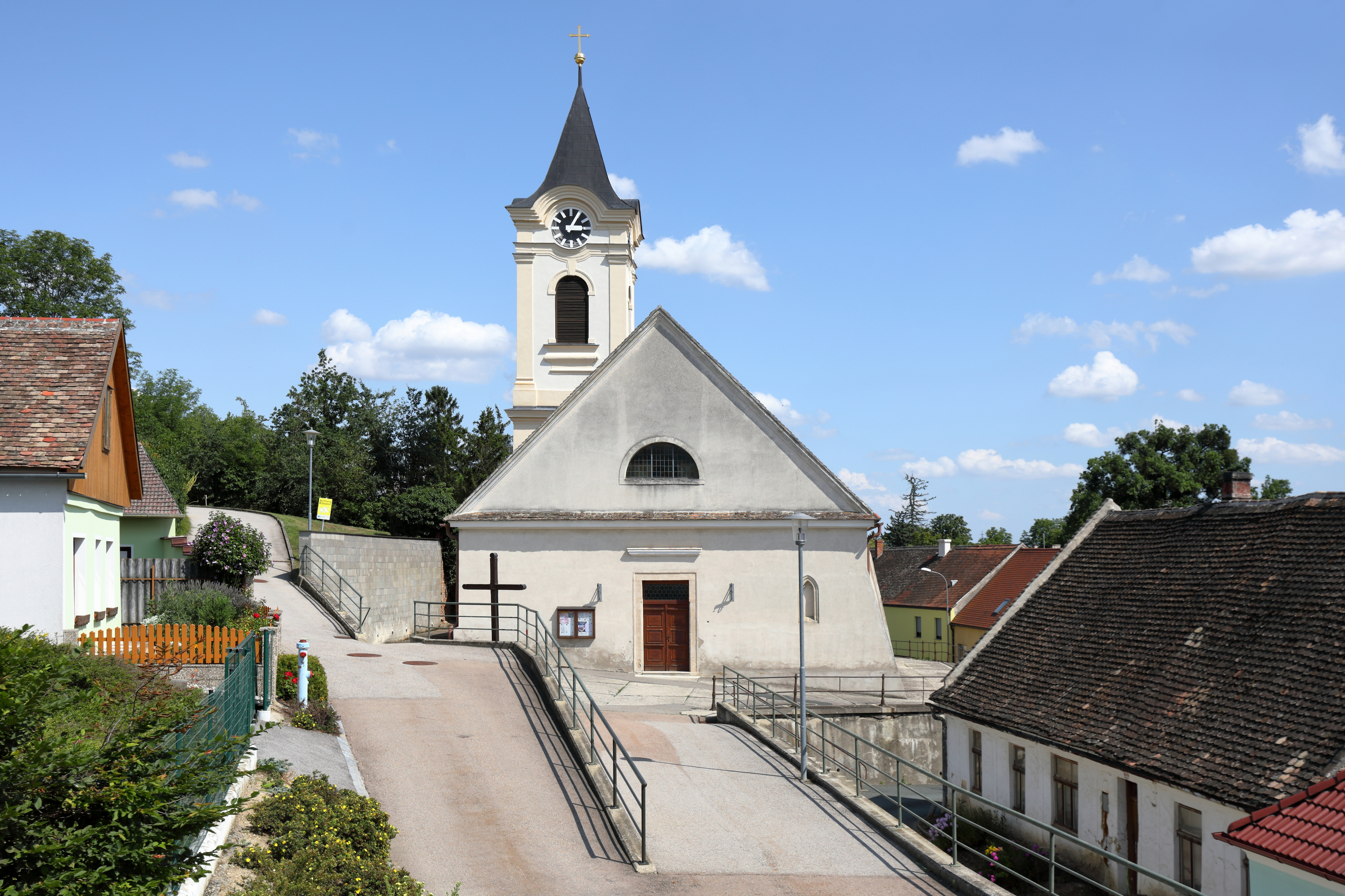 Westansicht der röm.-kath. Pfarrkirche hl. Johannes der Täufer in Mittergrabern, ein Ortsteil der niederösterreichischen Marktgemeinde Grabern.Ursprünglich eine gotische Staffelhallenkirche mit einem Nordturm aus dem 13. Jahrhundert. Später erfolgten frühbarocke Umbauten und um die Mitte des 19. Jahrhunderts fand eine umfassende Erweiterung Richtung Osten statt.